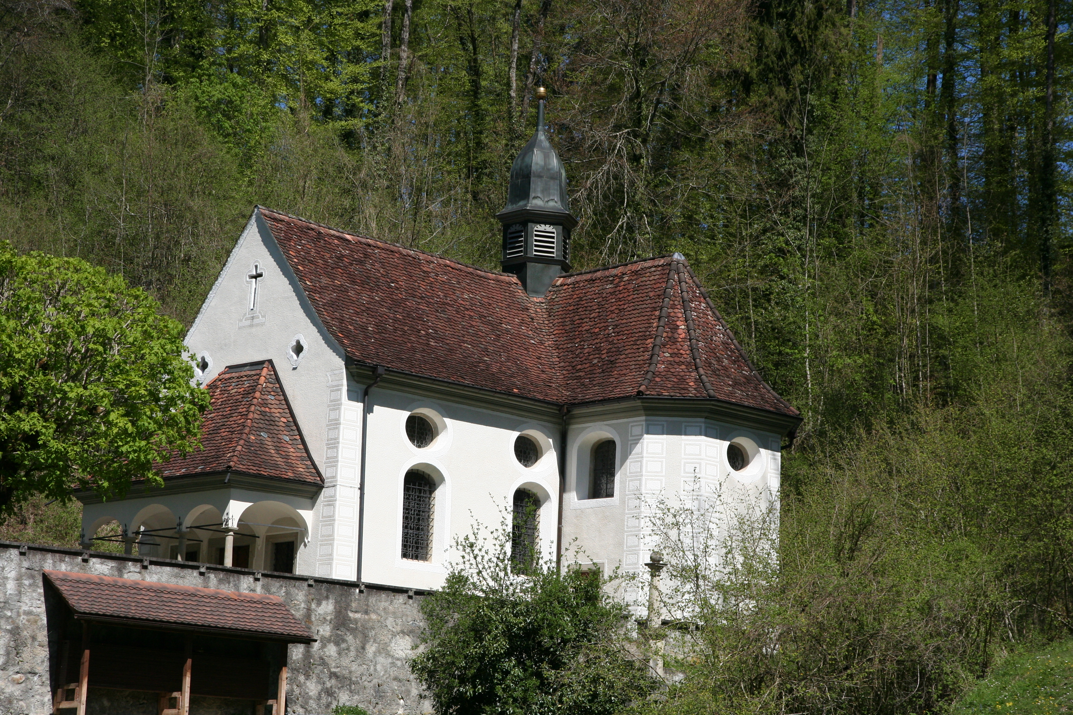 Wallfahrskapelle Jonental